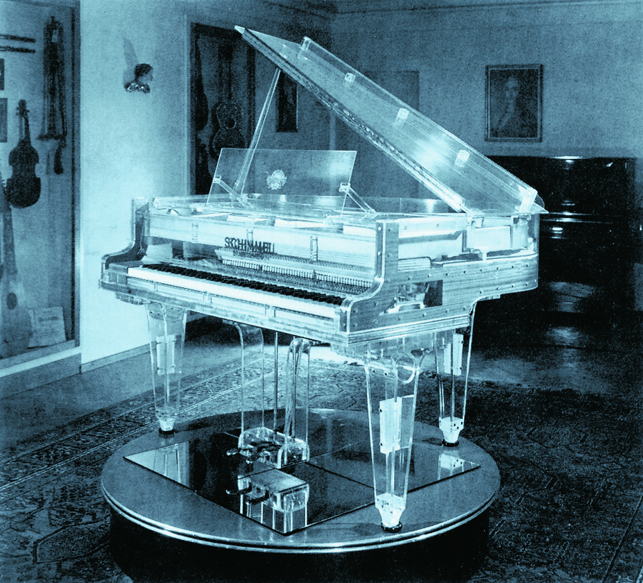 Schimmel Glasflügel, 1952